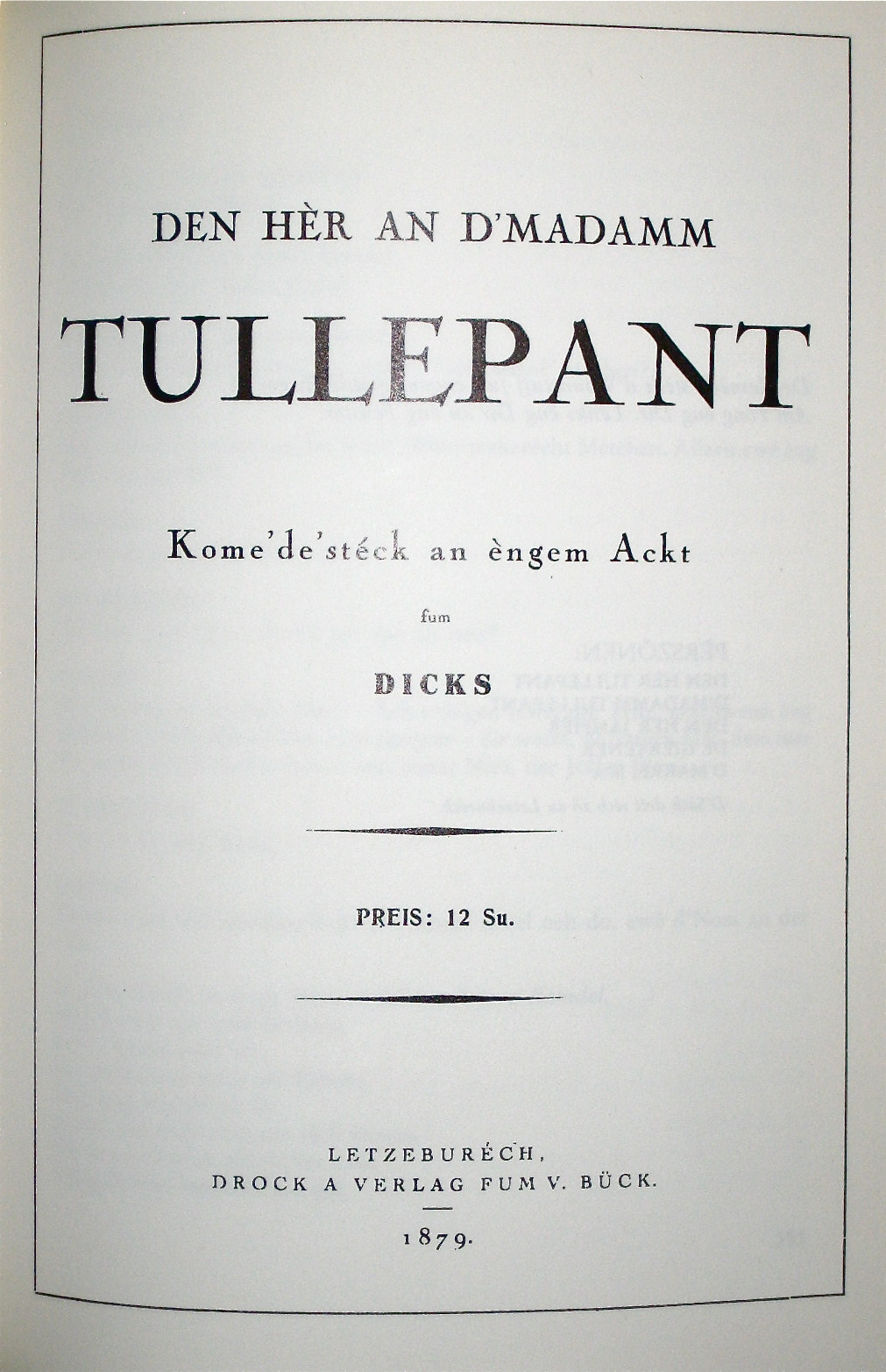 Facsimile vun der Titelsäit vum Dicks sengem Kaméidistéck Den Hèr an d'Madamm Tullepant (1879)